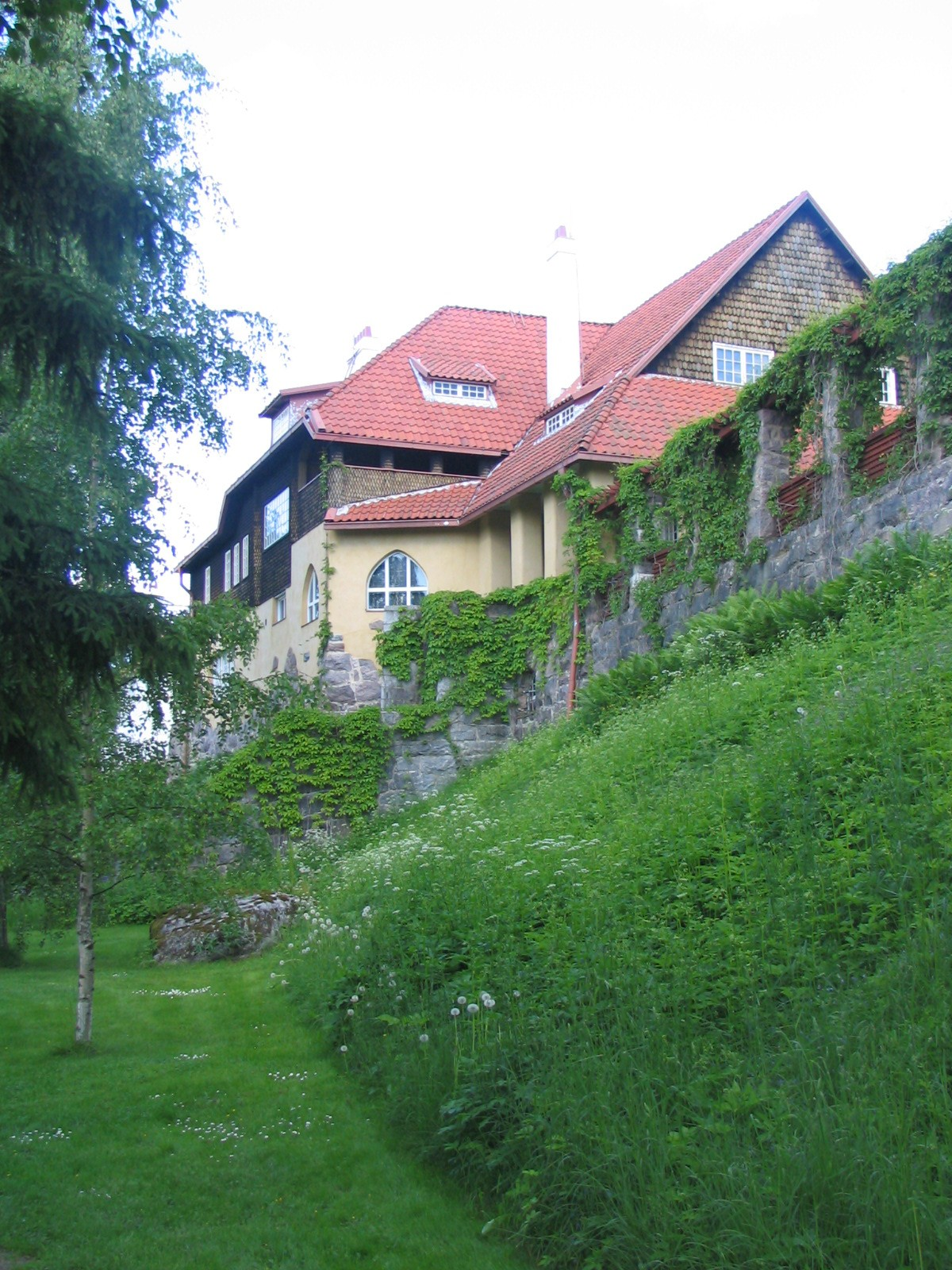 Hvitträsk, built 1901-1903. Architects: Eliel Saarinen, Herman Gesellius and Armas Lindgren. Photo Otto-Ville Mikkelä